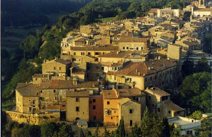 Canino (VT) - Castelvecchio (la parte più antica di Canino), vista dal "conservone". Foto di Giacomo Mazzuoli. L'autore mi ha dato di persona il consenso per l'uso su Wikipedia. --M/ 16:56, Lug 21, 2004 (UTC) Preso di -- Pippo-b 20:27, 11 March 2008 (UTC)